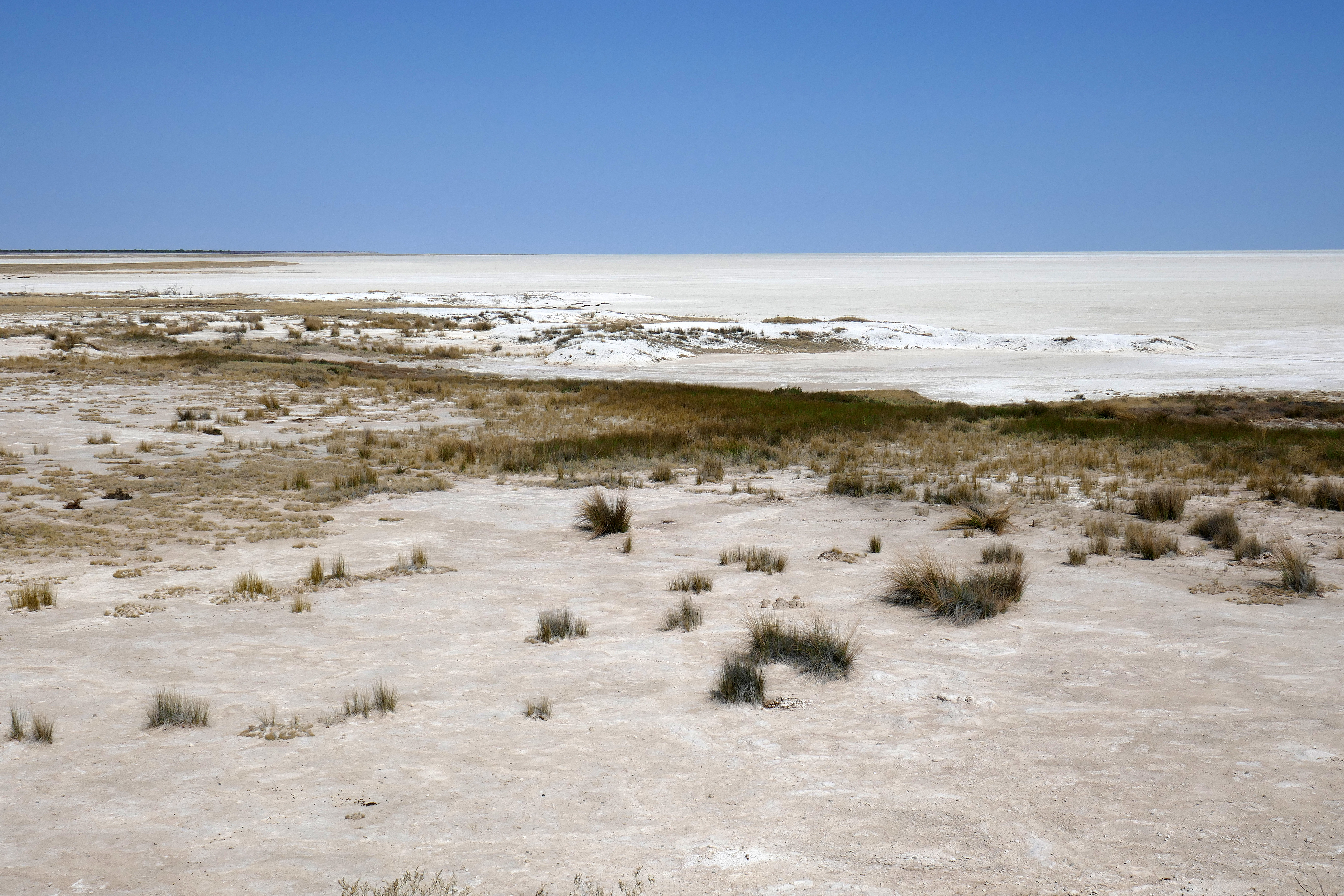 Etosha pan (Parc national d'Etosha, Namibie).